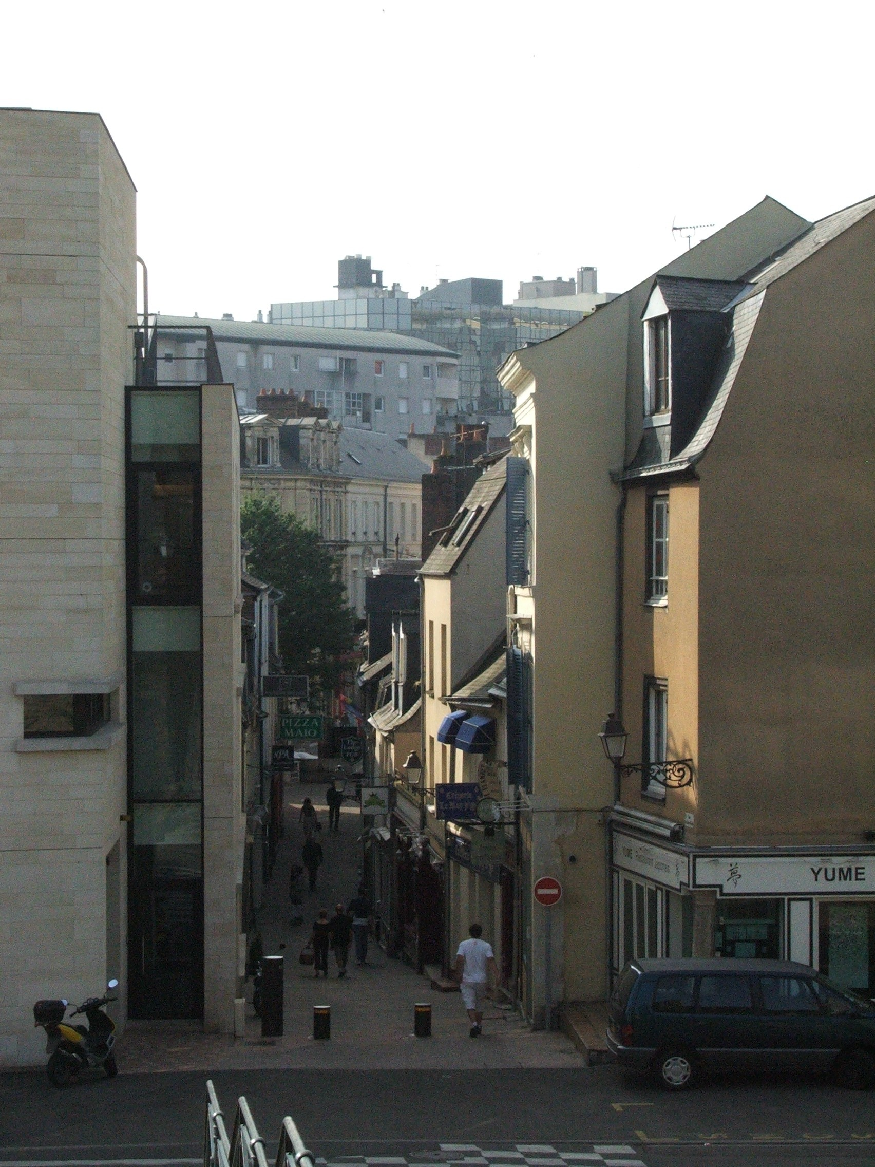 Vue sur le quartier Saint-Nicolas, centre ville commercial du Mans.